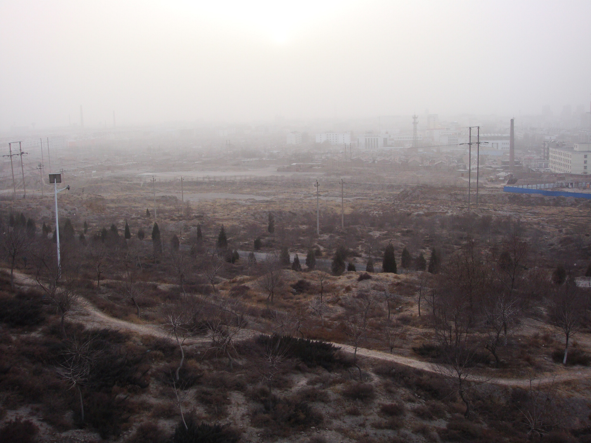 乌海春季风沙天气